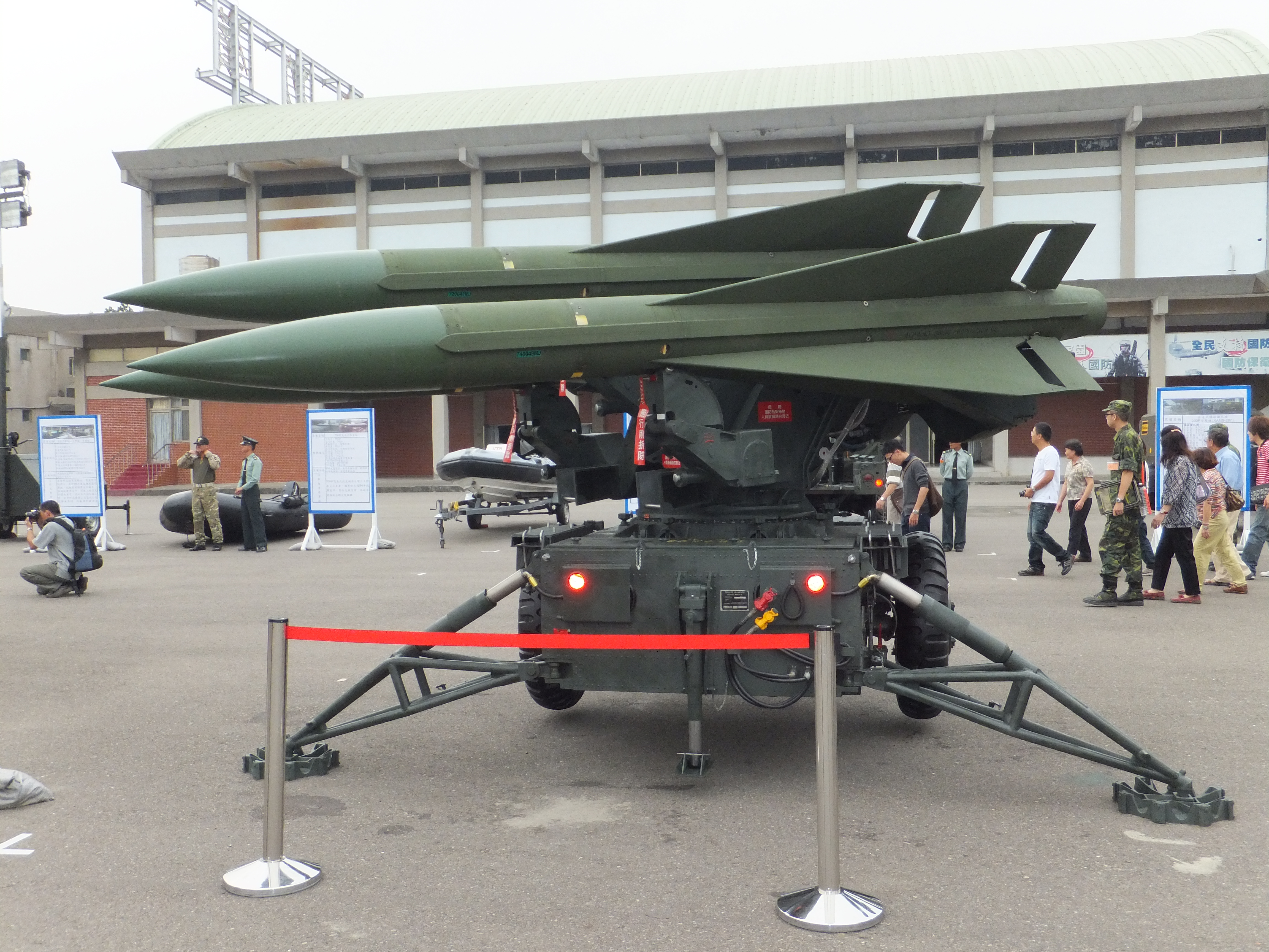 2011年陸軍成功嶺營區開放活動中，展示之鷹式防空飛彈與發射器。